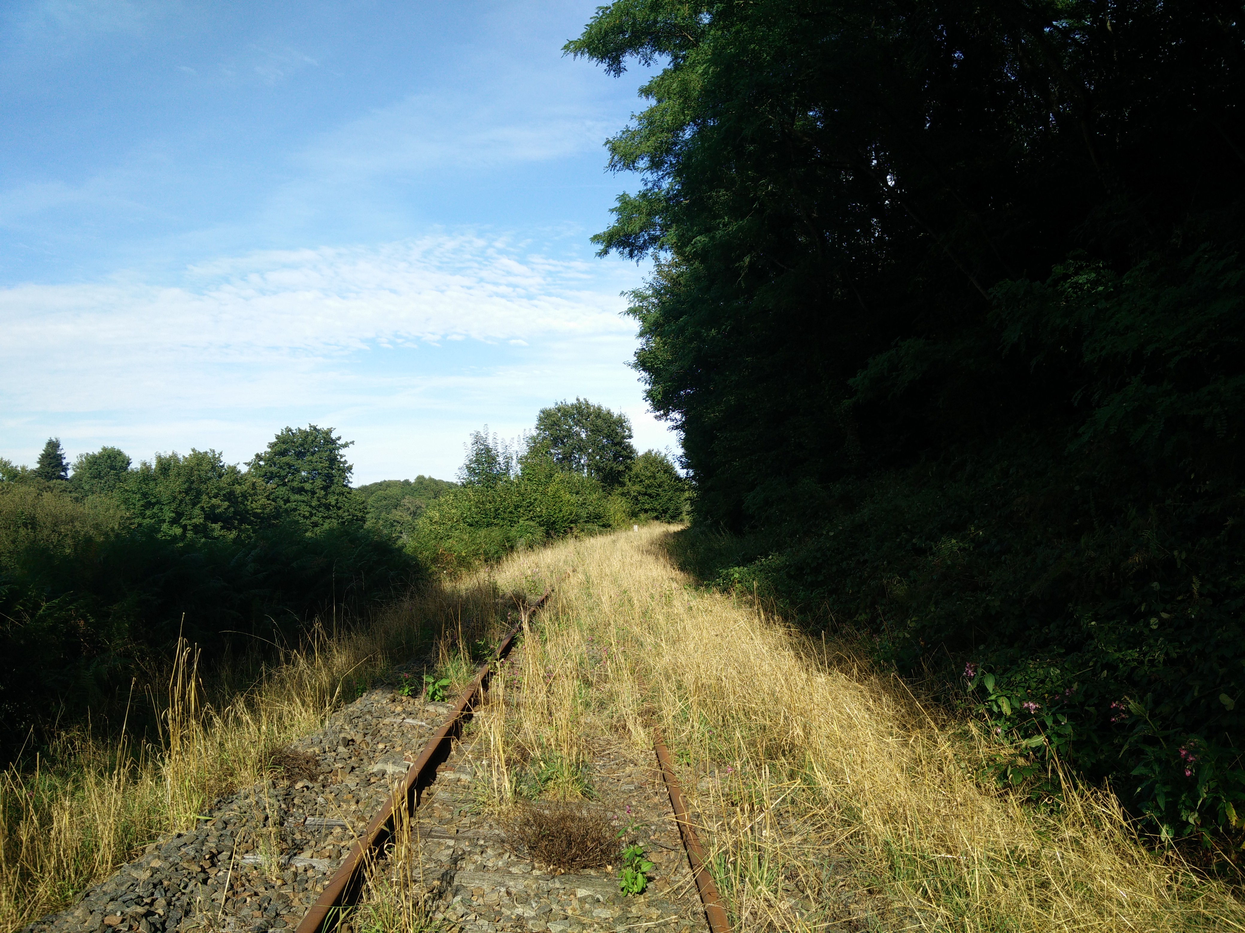 Photo prise sur la ligne de Limoges à Angoulême, hors-service depuis mars 2018